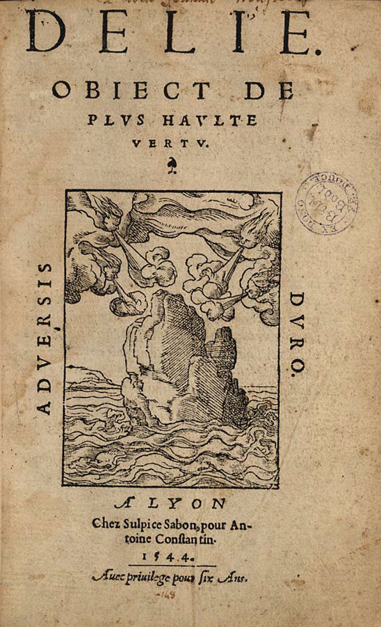 Page de titre intérieur de Délie